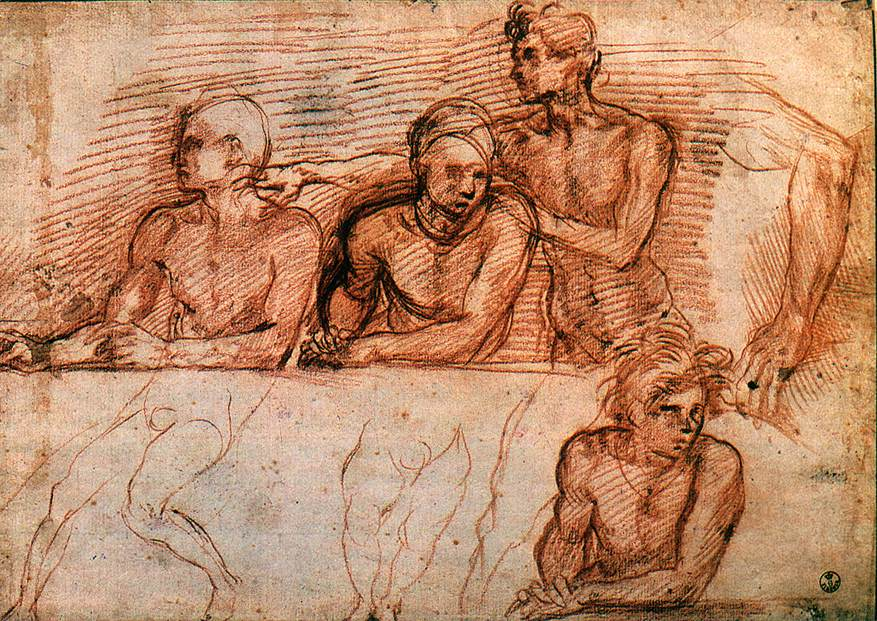 study